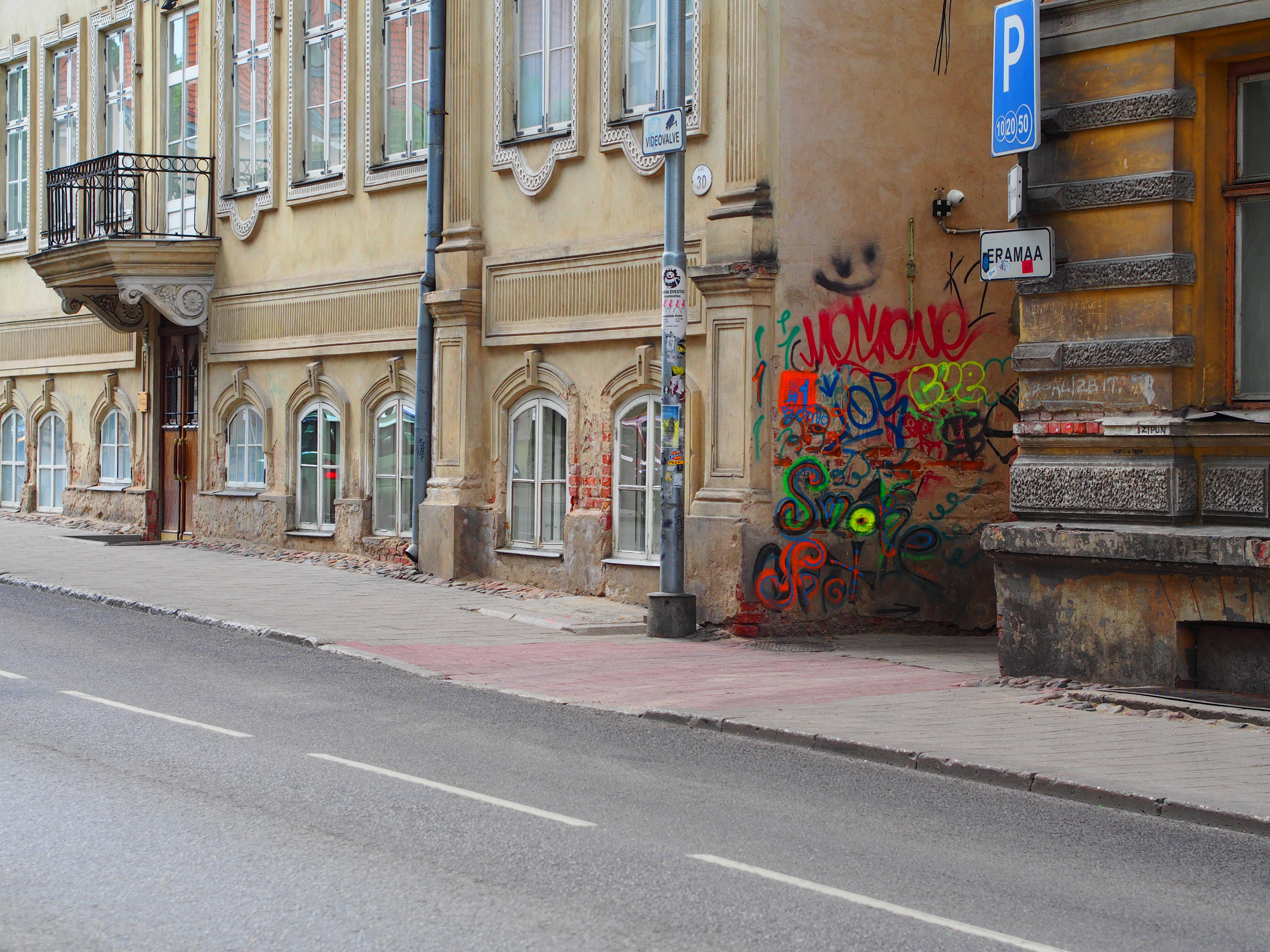 2016. aasta suvel pildistatud värvifoto on tehtud Laial tänaval. Näha on pubi Zavood aknad ja sissepääs maja sisehoovi.